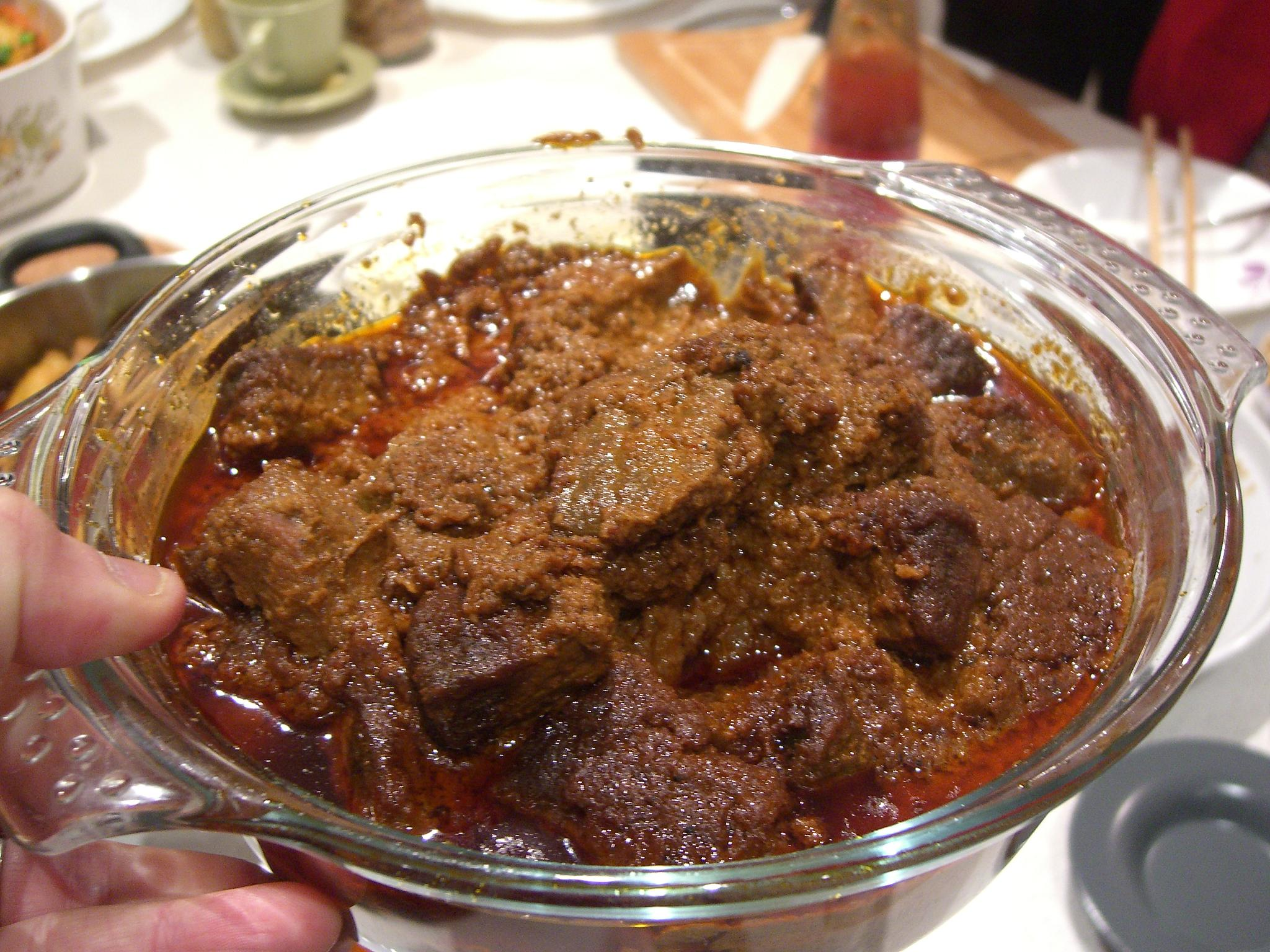 Aunt Lay Leong's Rendang Beef